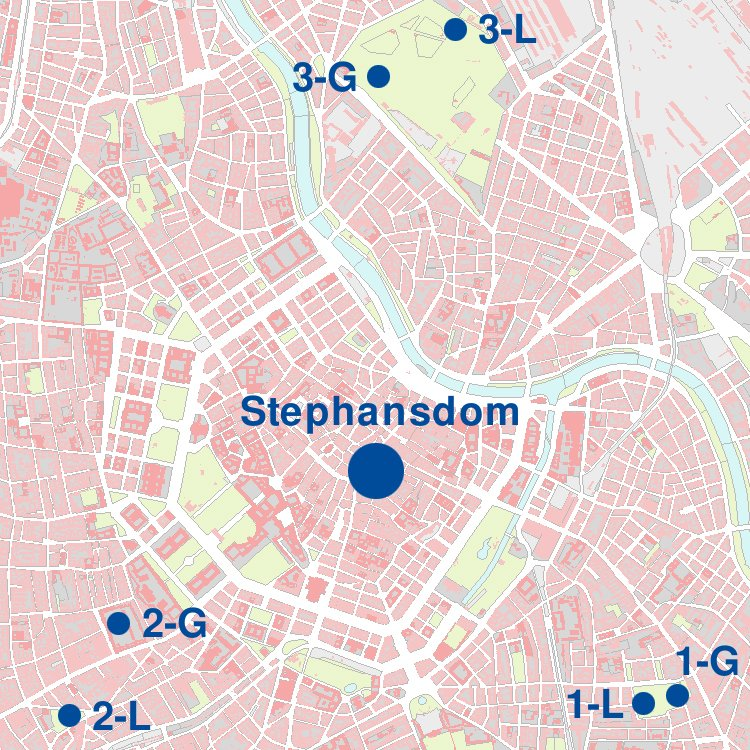 Die sechs Wiener Flaktürme, in deren Zentrum sich der Stephansdom befindet Legende (L = Leitturm, G = Geschützturm): 1-?: Paar 1: Arenbergpark 2-?: Paar 2: Stiftskaserne / Esterhazypark 3-?: Paar 3: Augarten